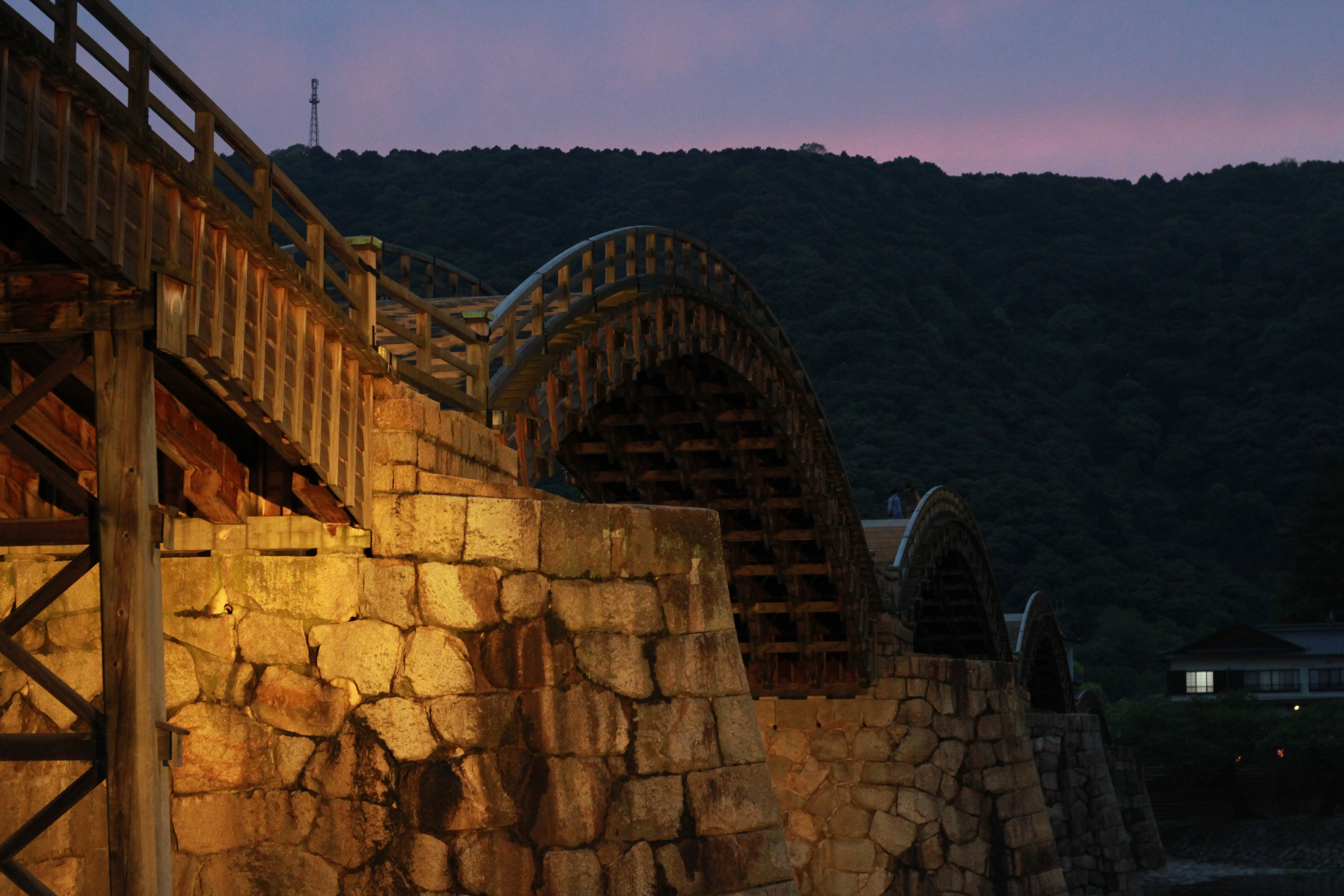 Kintaikyo or Kintai Bridge, Yamaguchi